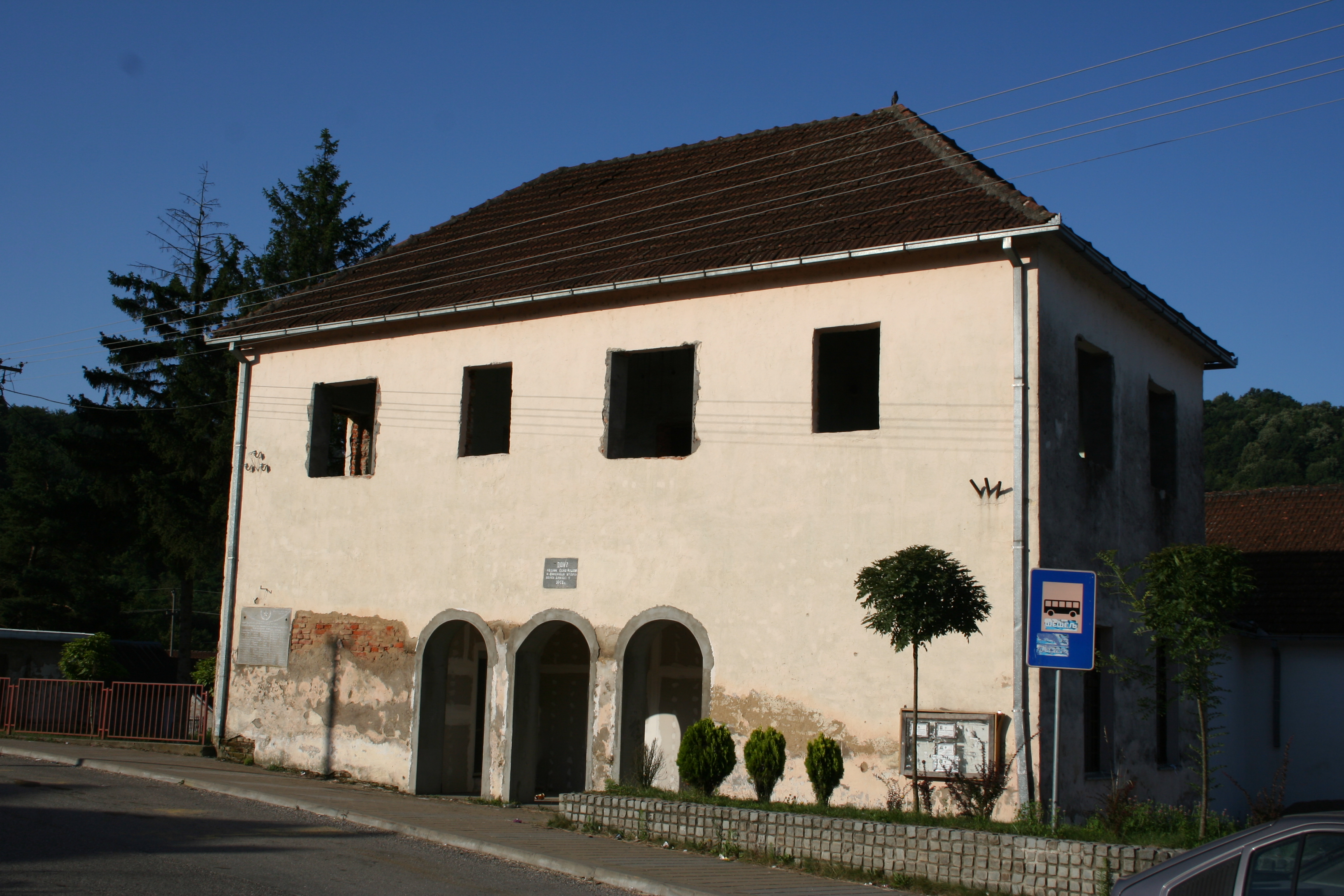 Dom kulture, Joševa